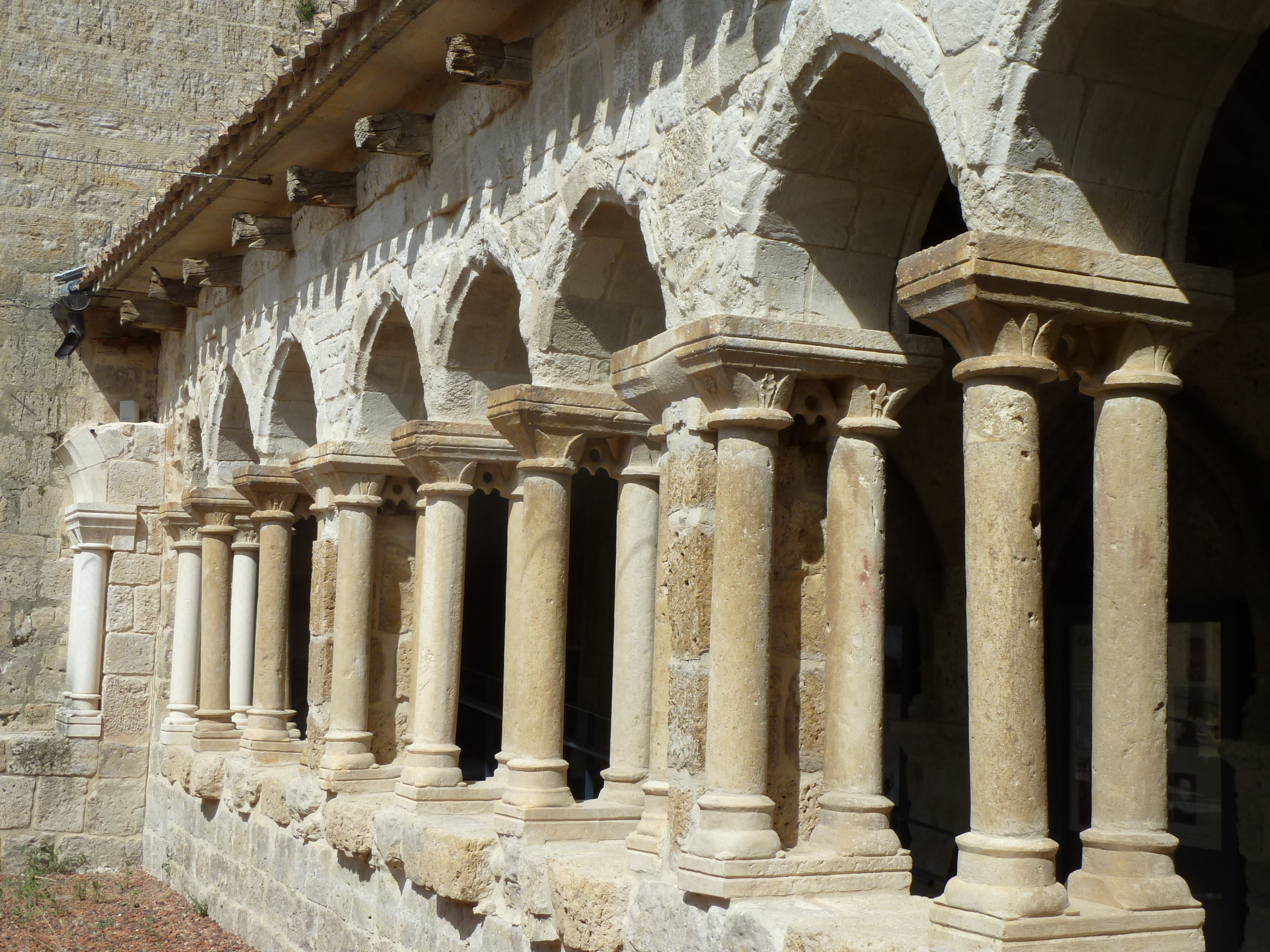 En los capiteles de las columnas hay algunas cruces pateadas, de origen templario.